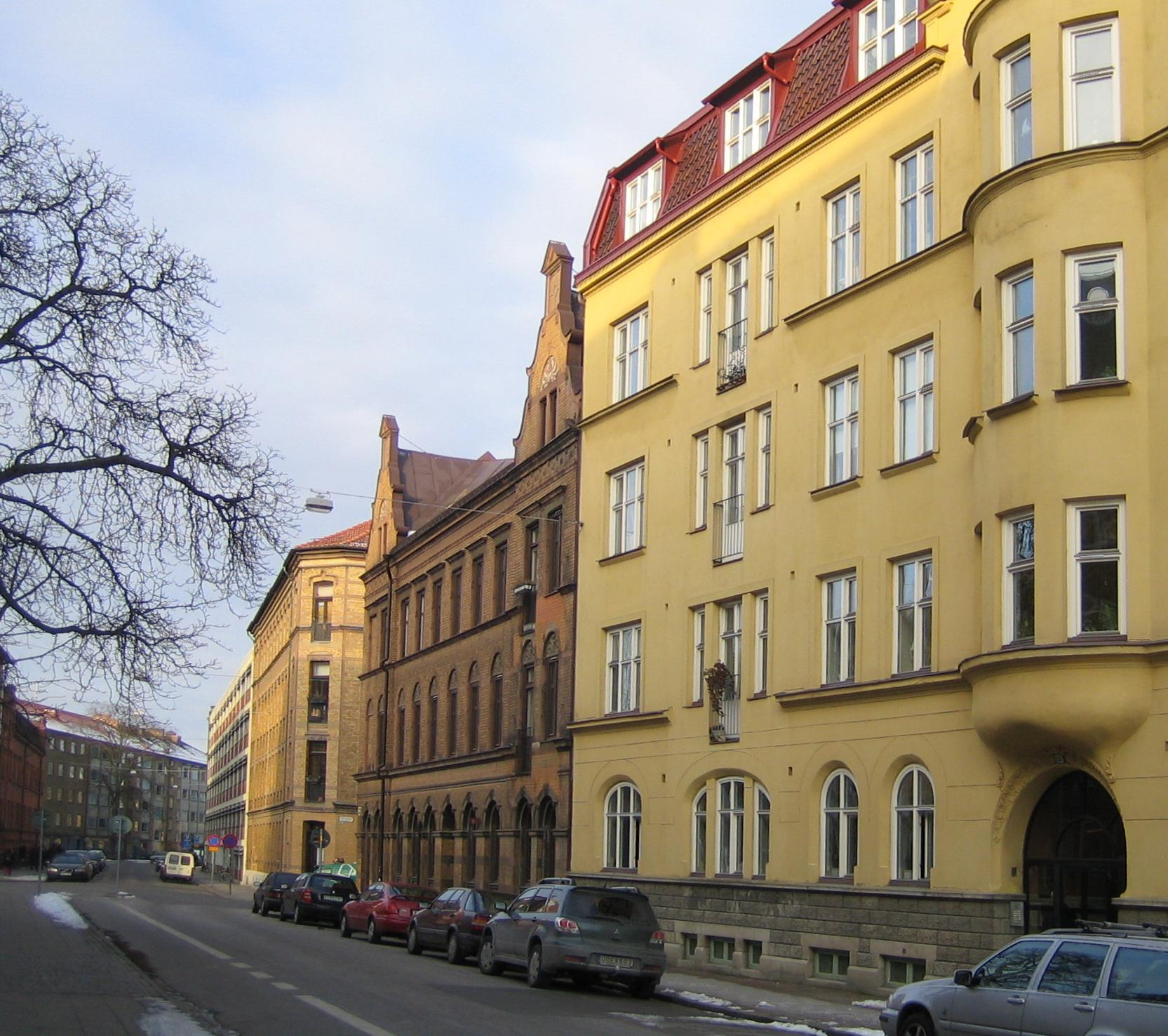 V Rönneholmsvägen in Malmö, Sweden.